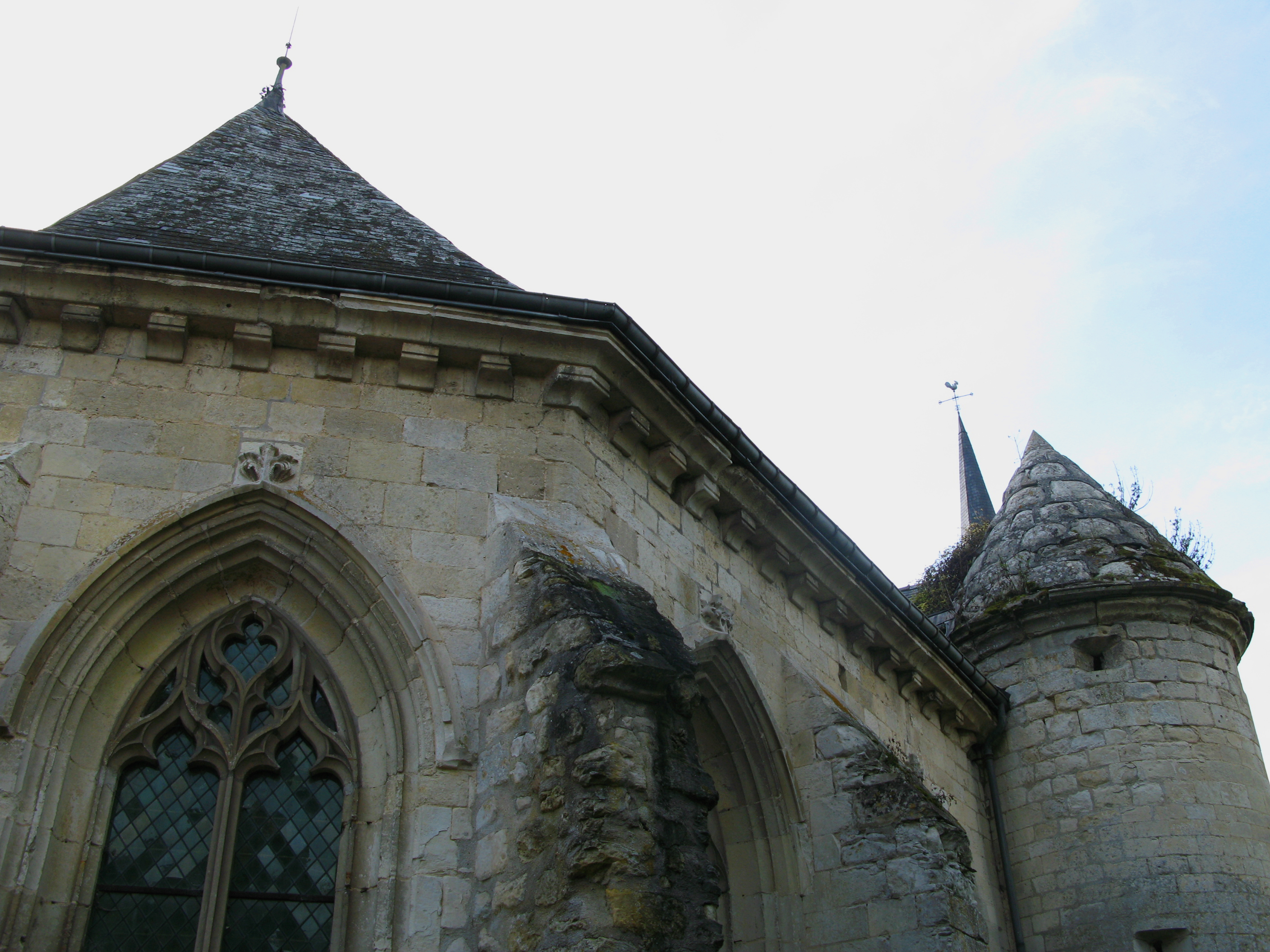 Agnicourt-et-Séchelles (Aisne, France) - L'église fortifiée d'Agnicourt (choeur face nord). Il est à noter que la tour est couverte de pierre et non d'ardoise ! On remarque la végétation "s'installant" sur la pierre.